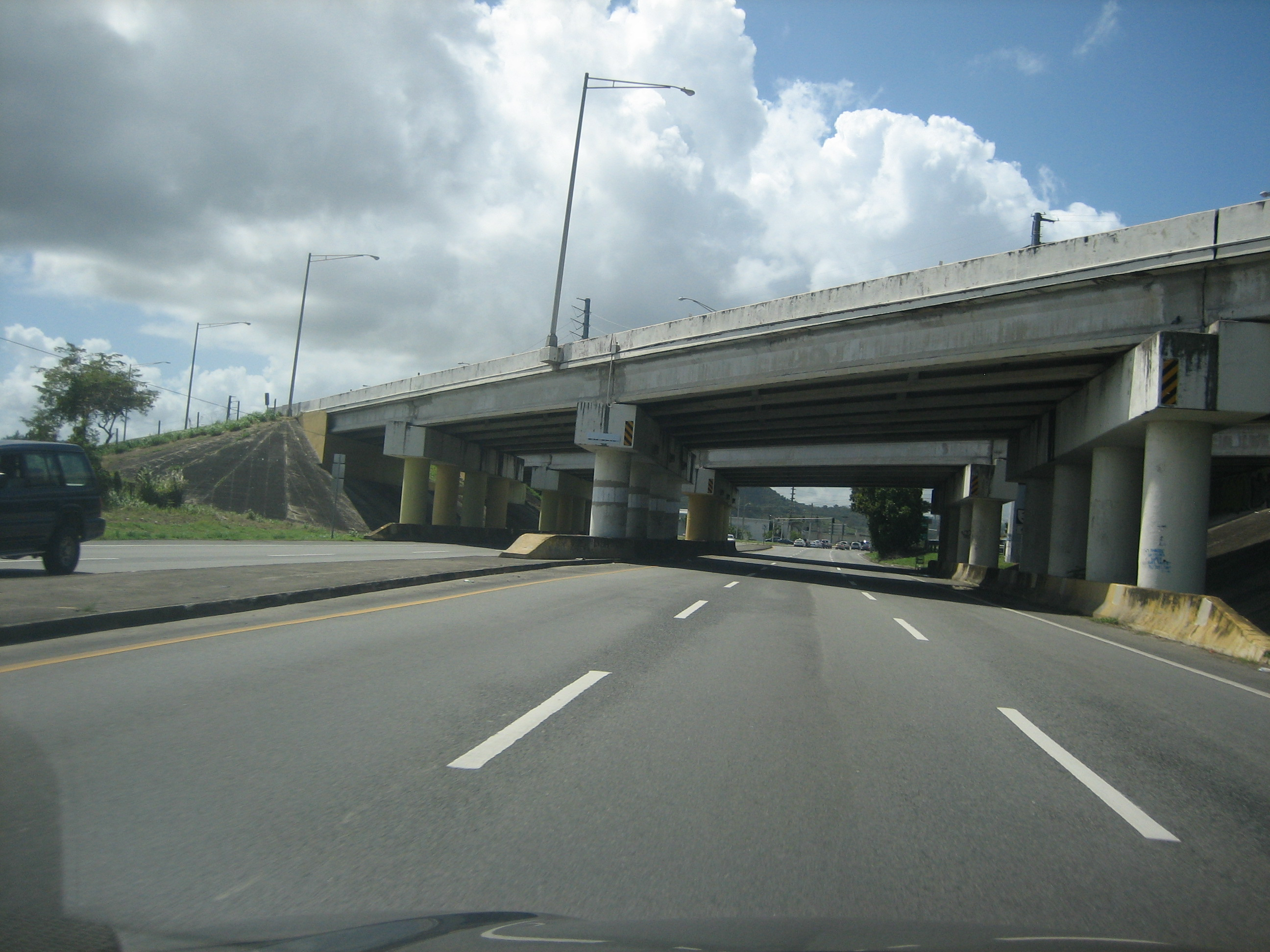 Highway